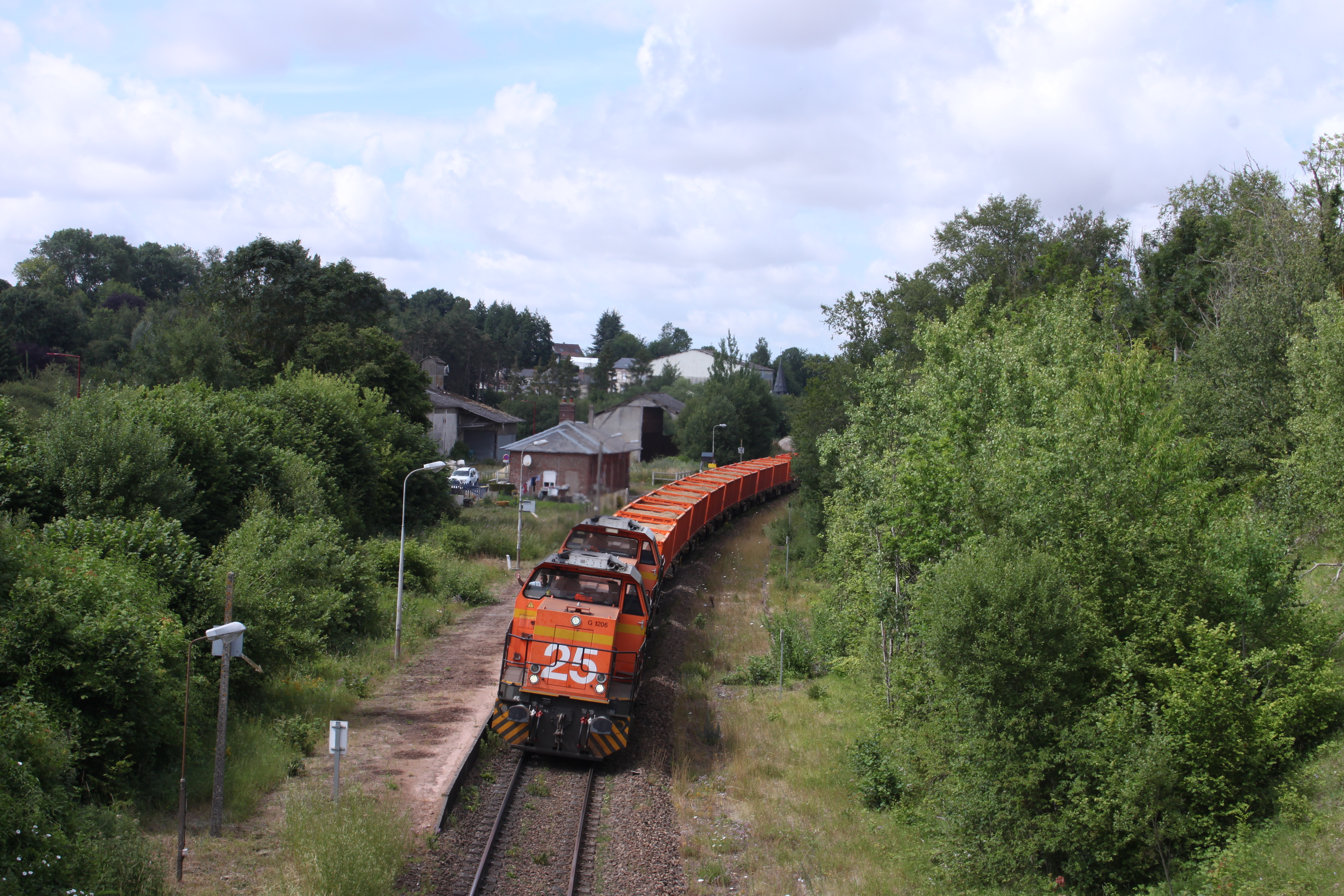 Trains de terre provenant de la zone industrielle de Rouxmesnil-Bouteilles à destination de Rouen passe la gare de Saint-Victor-l'Abbaye (située sur le territoire de la commune de Saint-Maclou-de-Folleville) .